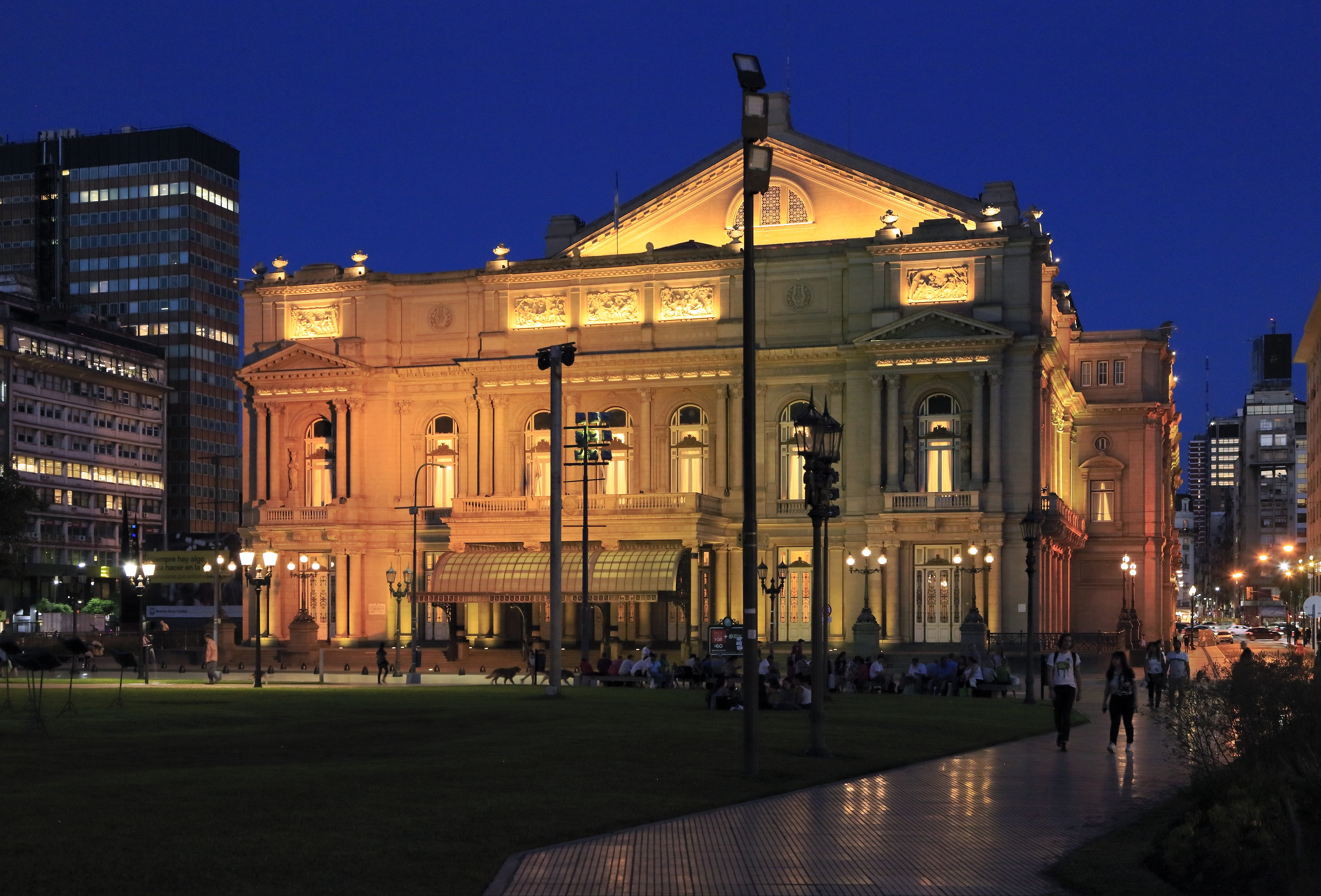 Westseite von der Plaza Lavalle, hier liegt der Haupteingang. Die heutige Prachtstraße Avenida 9 de Julio auf der Rückseite des Gebäudes existierte zurBauzeit des Theaters noch nicht.